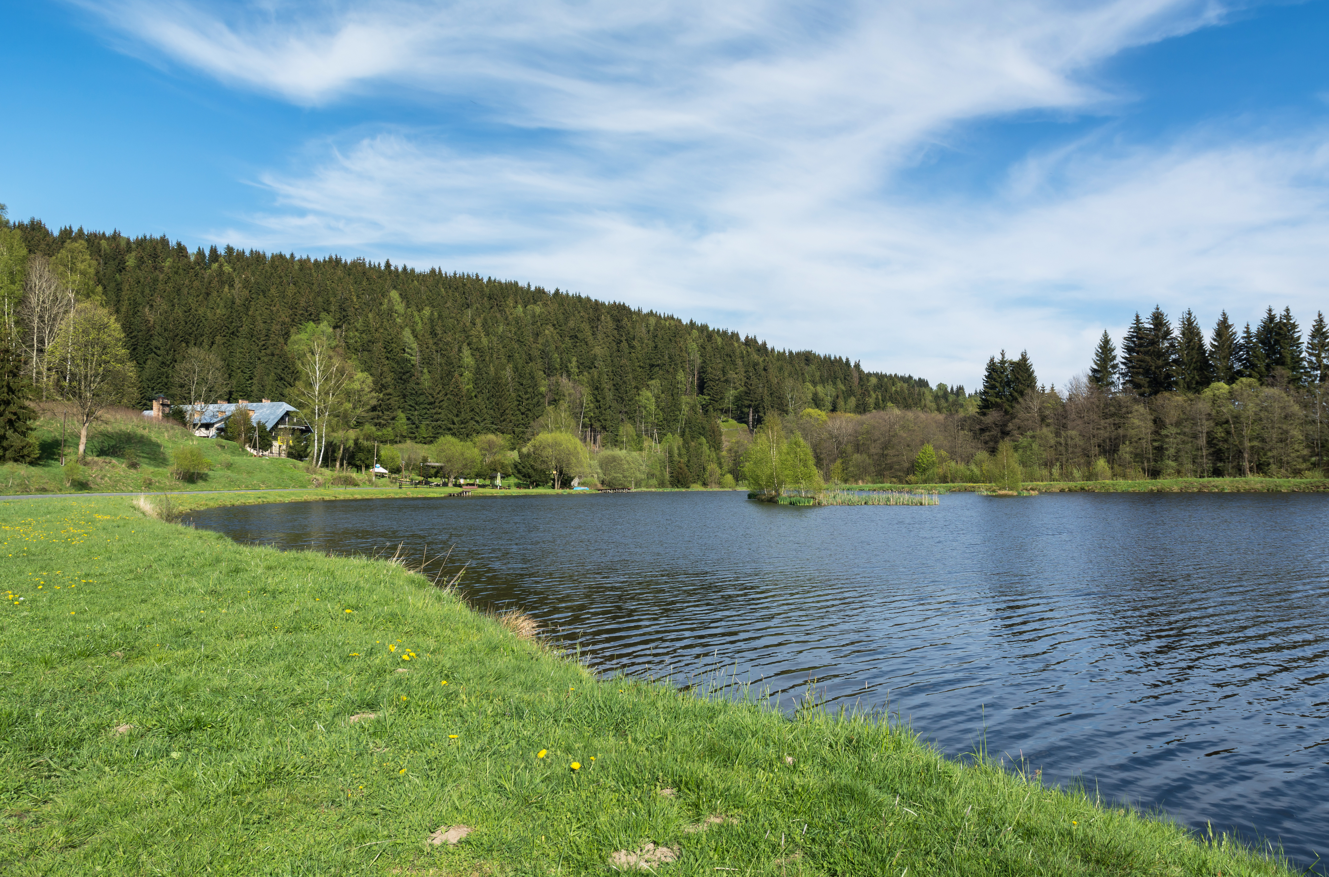 Specjalny obszar ochrony siedlisk Dzika Orlica. This is a photography of Natura 2000 protected area with ID PLH020061